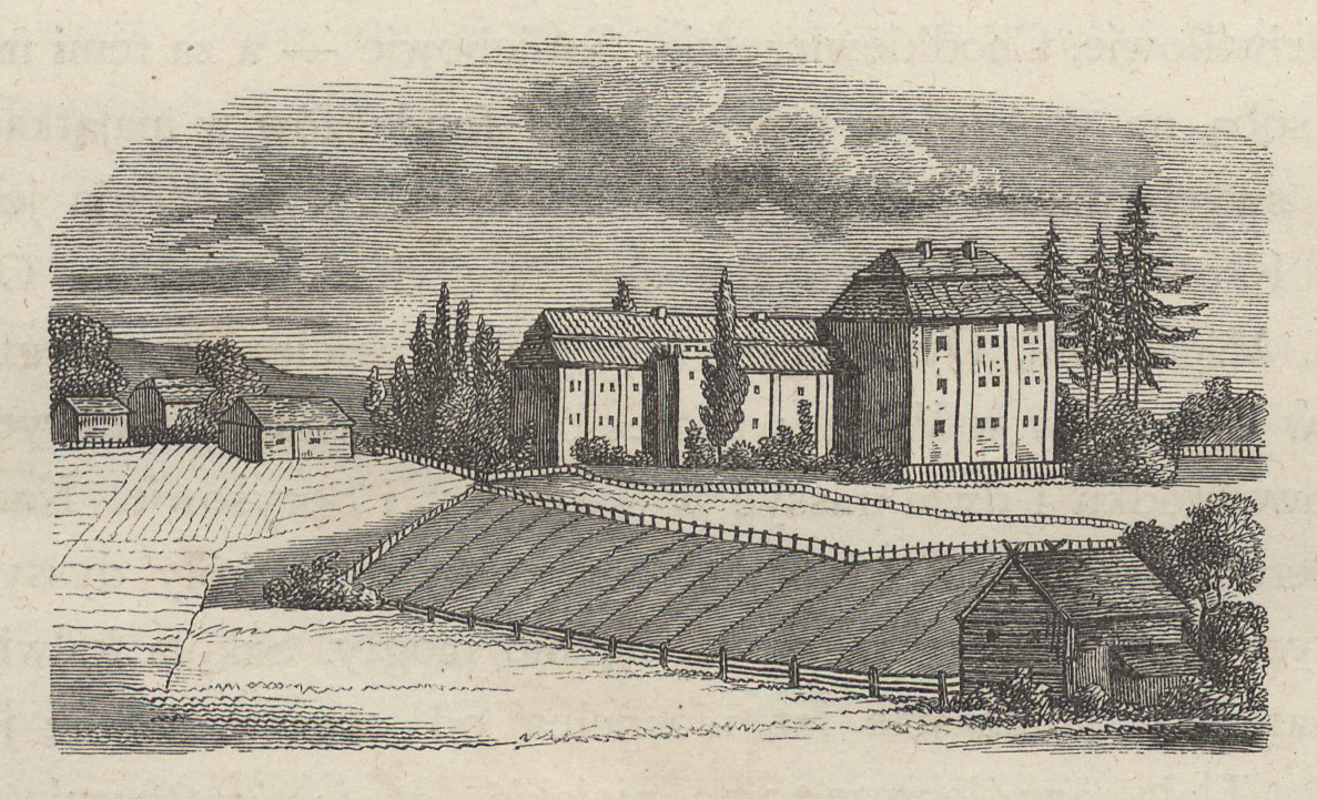 Беларуская (тарашкевіца): Жодзішкі (Žodziški). Калегіюм езуітаў